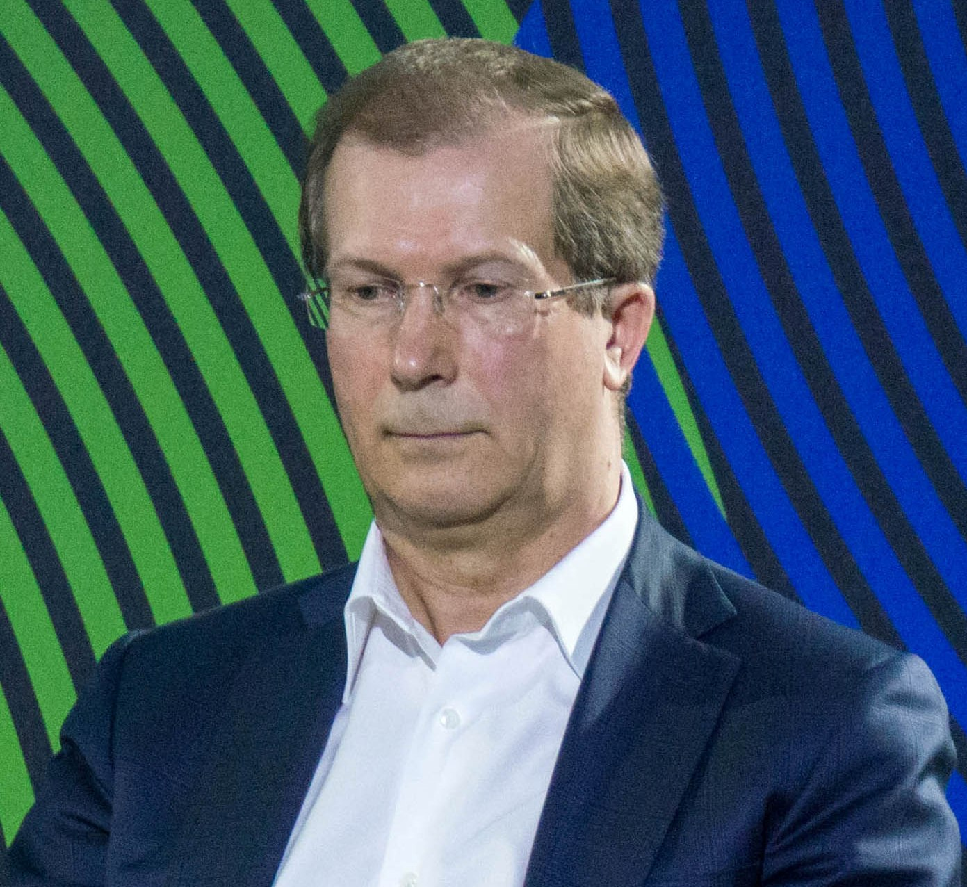 Виктор Шкулёв на конференции MediaMakers 2015